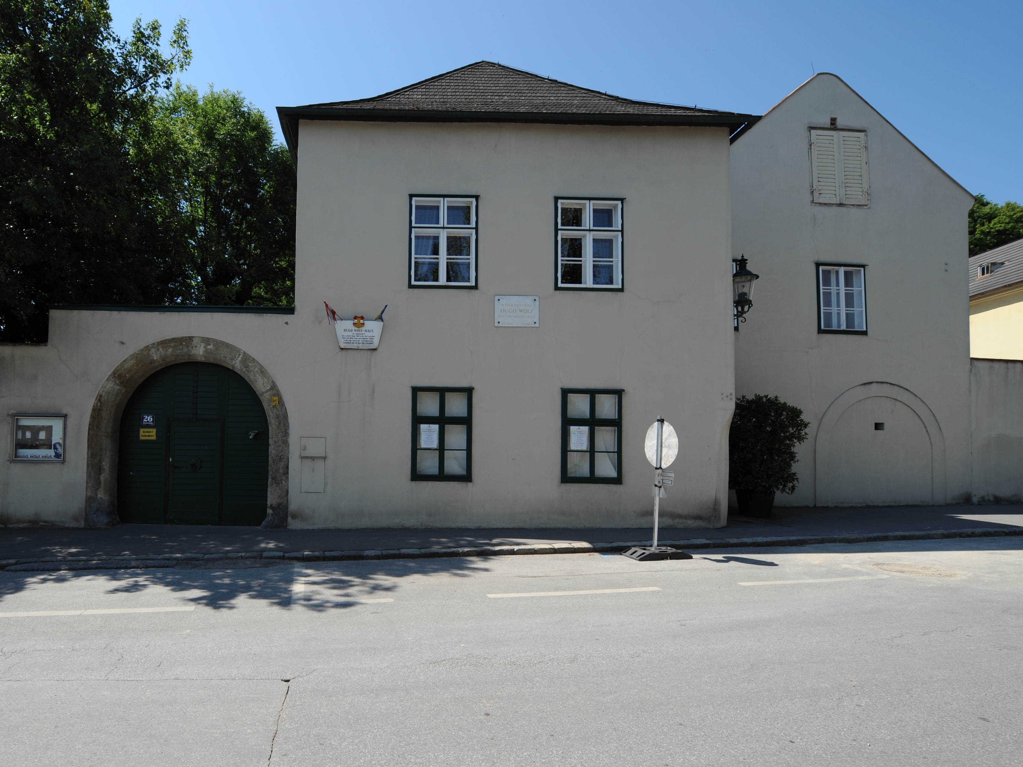 Perchtoldsdorf: Hugo-Wolf-Haus, Montserrater Hof, Brunner Gasse 24-26